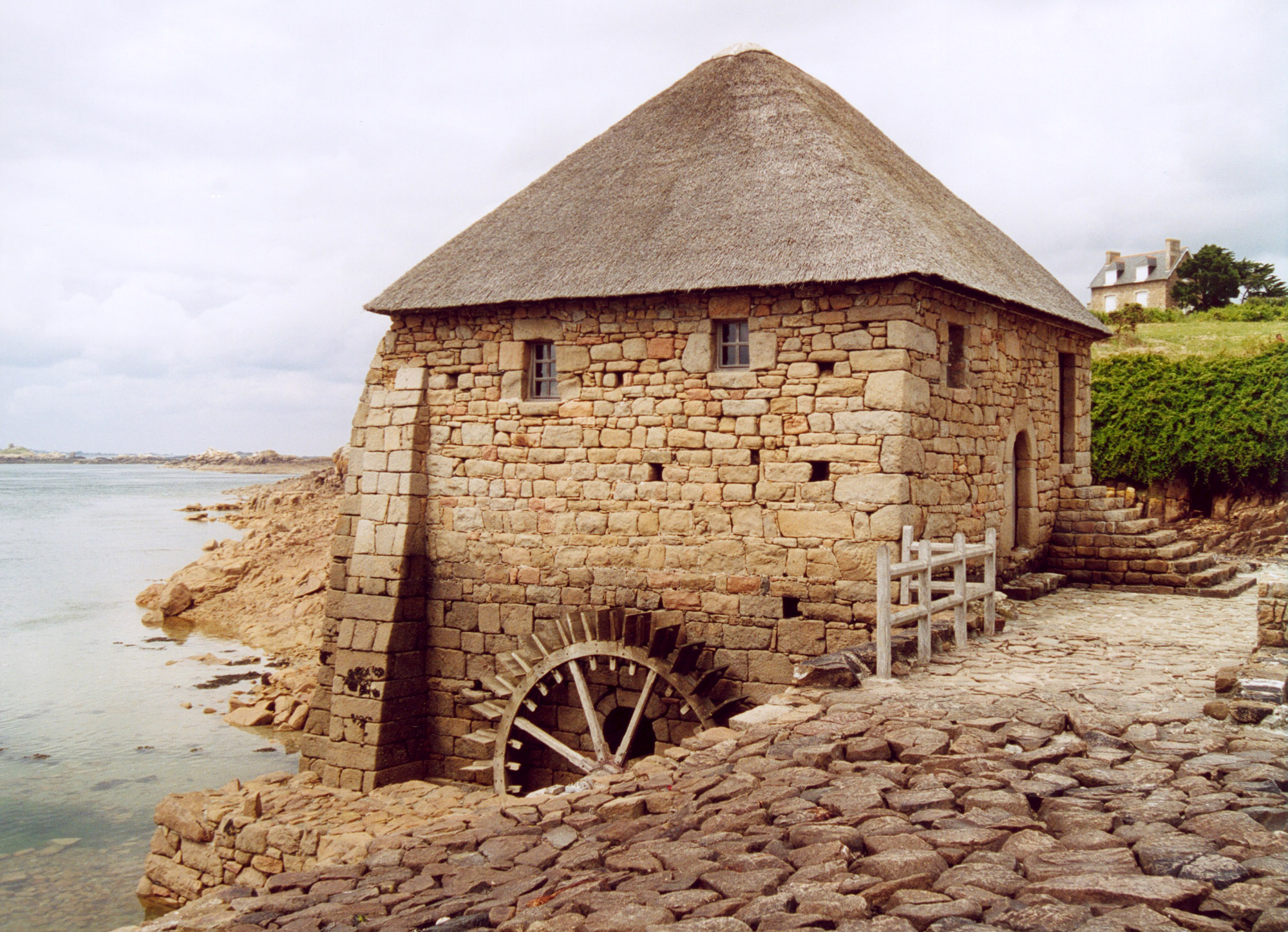 Bretagne Ile de Bréhat Auteur : GIRAUD Patrick